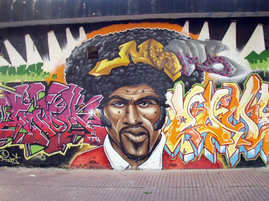 Graffiti en Móstoles